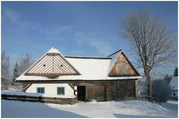 Skanzen Veselý kopec v zimě - chalupa z Lezníku.